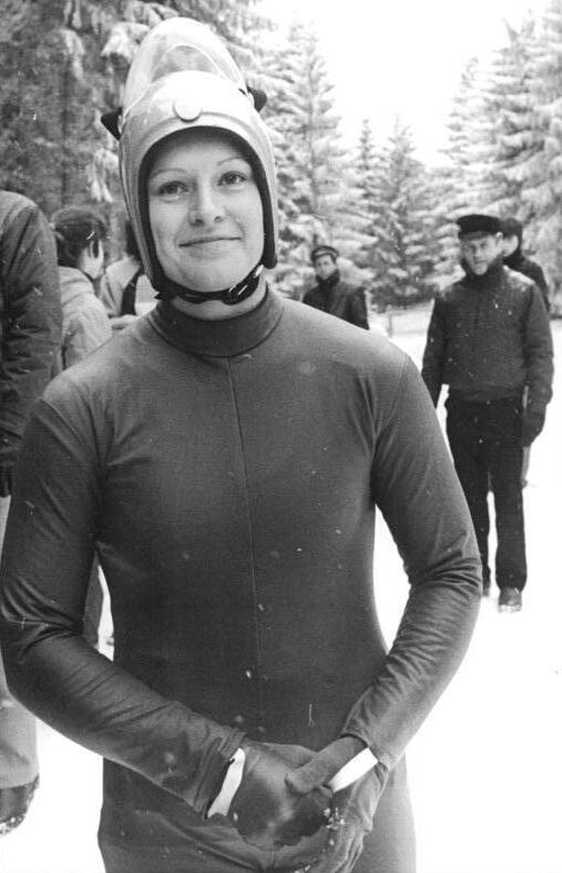 Ute Oberhoffner ADN-ZB Schaar 5.1.1985-Bez. Suhl: Vorschaumotiv zu den XXIV. Weltmeisterschaften im Rennschlittensport vom 21. bis 28. Januar 1985 in Oberhof-Die 23jährige Oberhofer ASK Sportlerin Ute Oberhoffner wurde am 30.12.1984 auf der WM-Bahn DDR-Meisterin 1985 (Foto) und hofft auf einen Medaillenplatz beim diesjährigen Höhepunkt im Rennschlittensport. In Sarajevo erkämpfte sie die Olympische Bronze-Medaille.